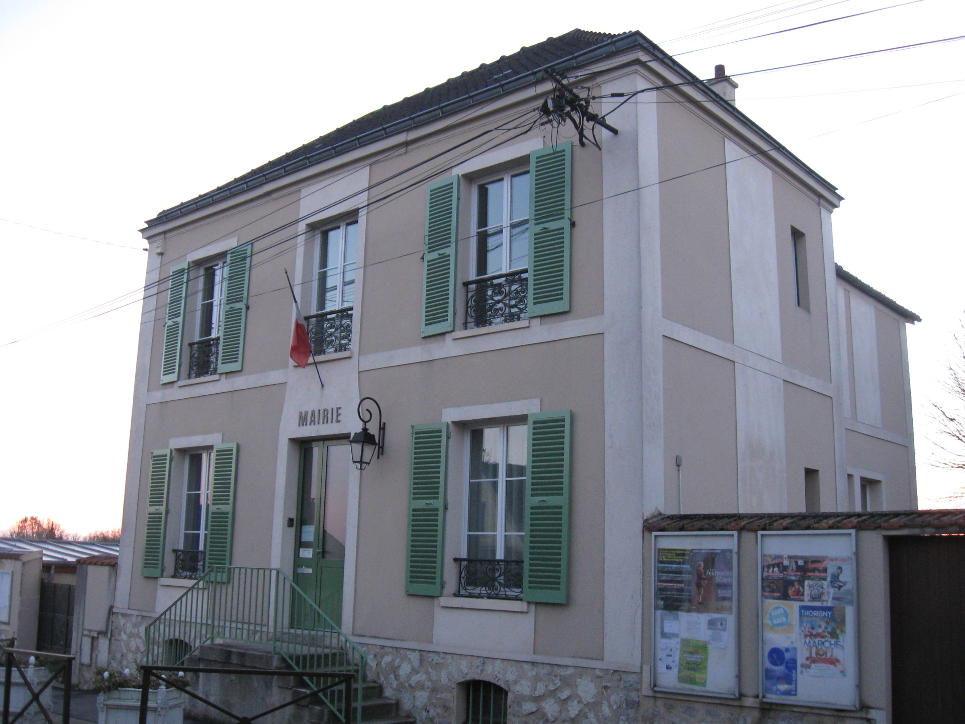 Mairie de Carnetin. (Seine-et-Marne, région Île-de-France).